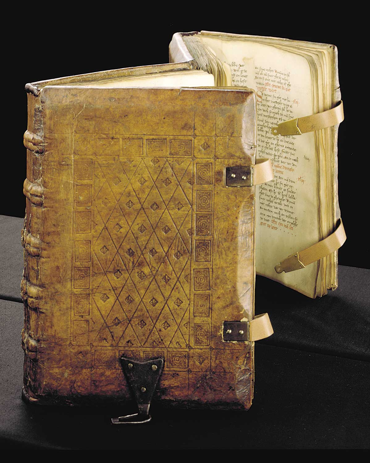 Sachsenspiegel-Handschrift von 1385 (Schwesterhandschrift des Harffer Sachsenspiegels), Fotografiert von Britta Lauer